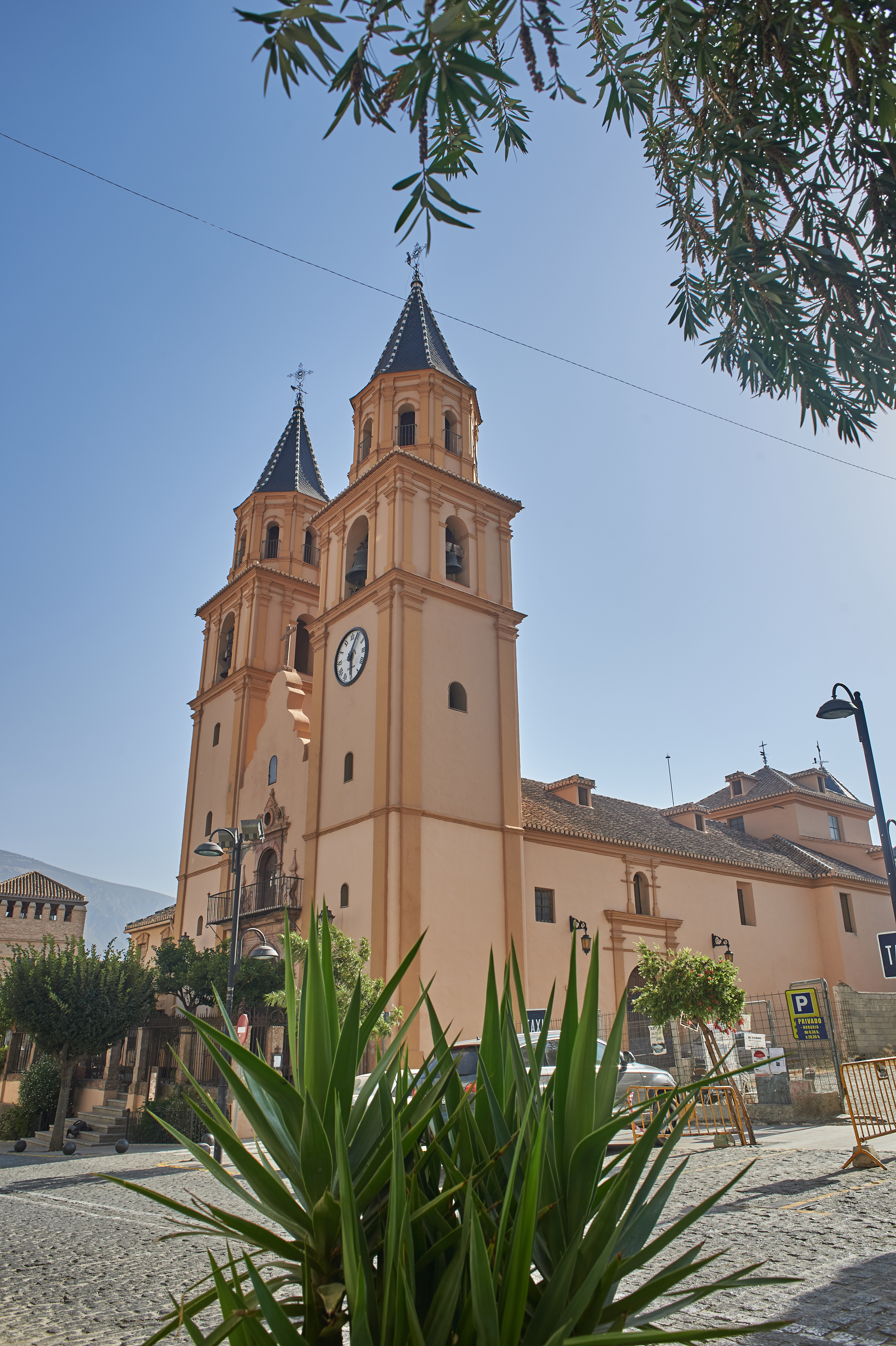 Exterior de la Iglesia Parroquia de Nuestra Señora de la Expectación de Órgiva (Granada).